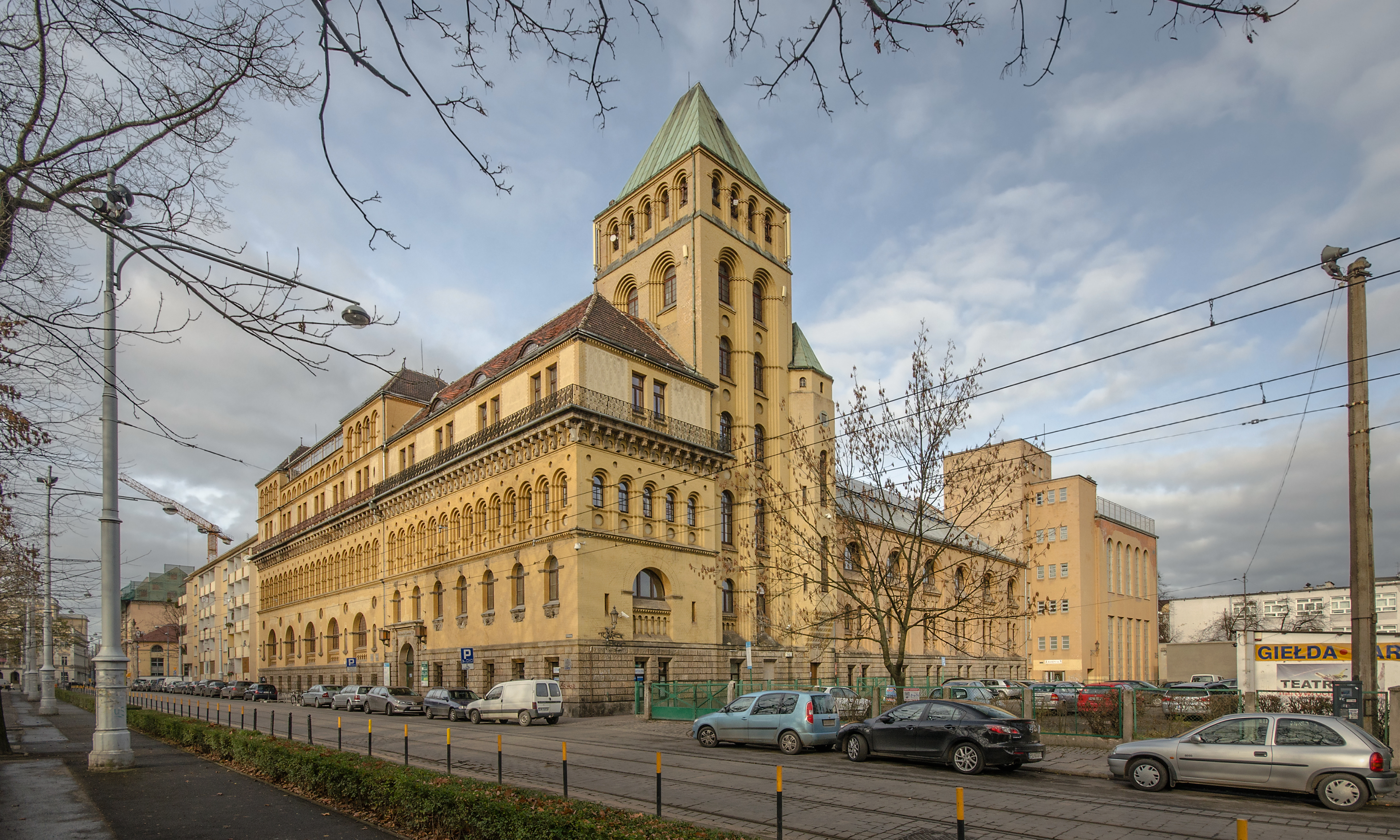 Wrocław, łaźnia miejska, 1897, 1908, 1925